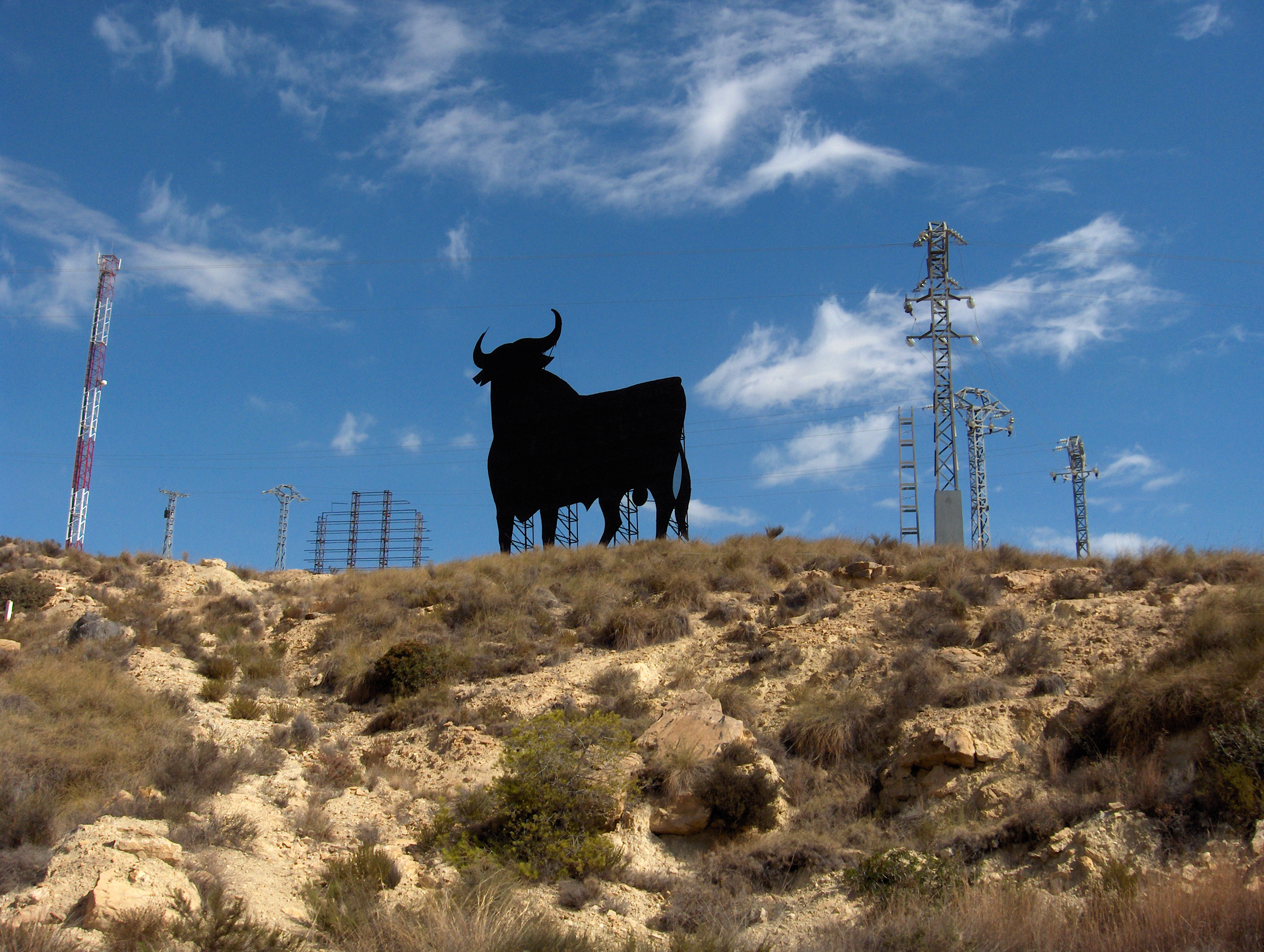 El toro de Osborne de Venta Lanuza, en la zona norte de El Campello (España), situado entre la autopista AP-7 y la N-332. (ref) La foto fue tomada el 3 de octubre de 2005 (día del eclipse anular de sol), a pulso, sin parar el coche, desde la carretera nacional (dirección sur, para más señas). Autor: Kokoo.